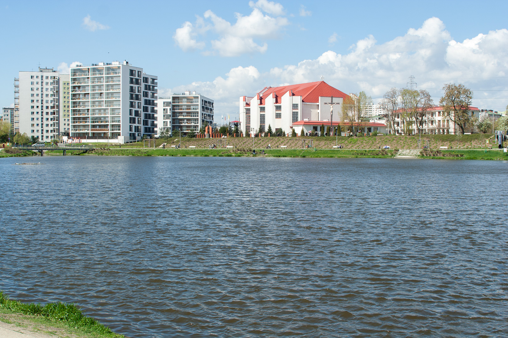 Jeziorko Balaton w Parku nad Balatonem, Gocław, Warszawa. Dalej Kościół Świętych Apostołów Jana i Pawła nad skarpą tarasu nadzalewowego Wisły. Jeziorko położone jest na tarasie zalewowym.